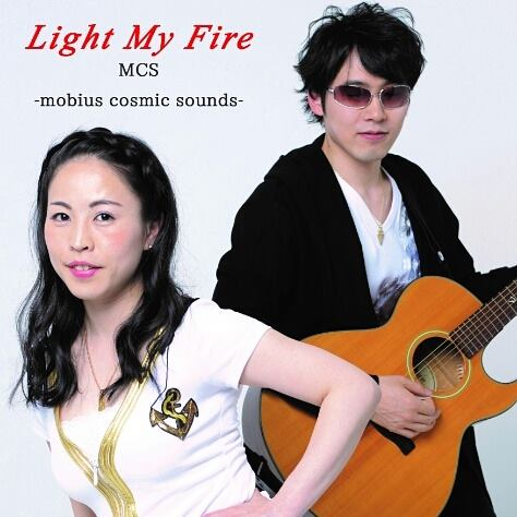 「Light My Fire」MCS-mobius cosmic sounds- ジャケット画像